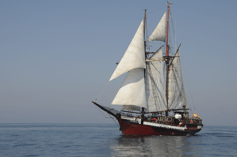 desde lejos